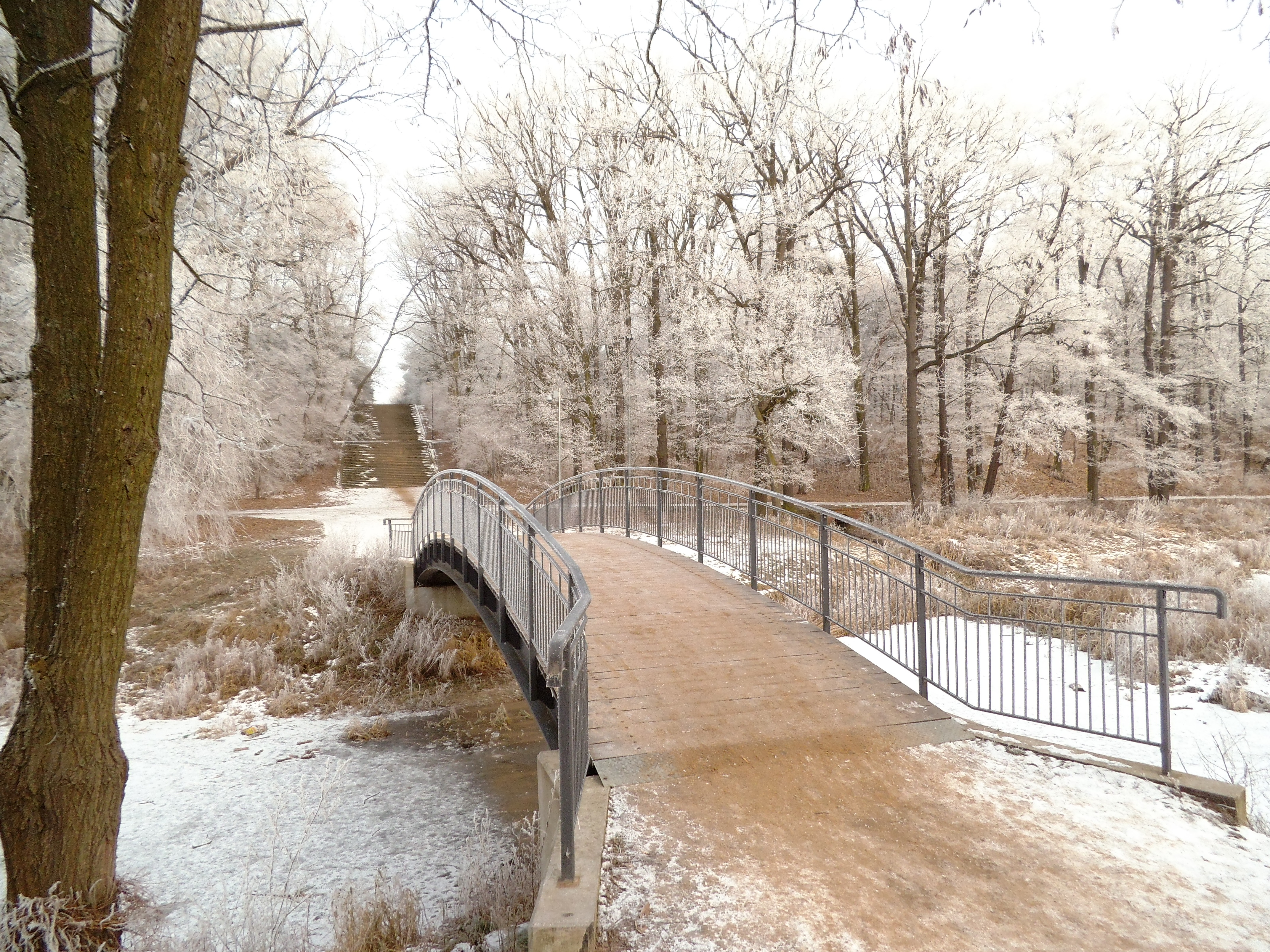 Toruń - Park Miejski, zima 2016 rok